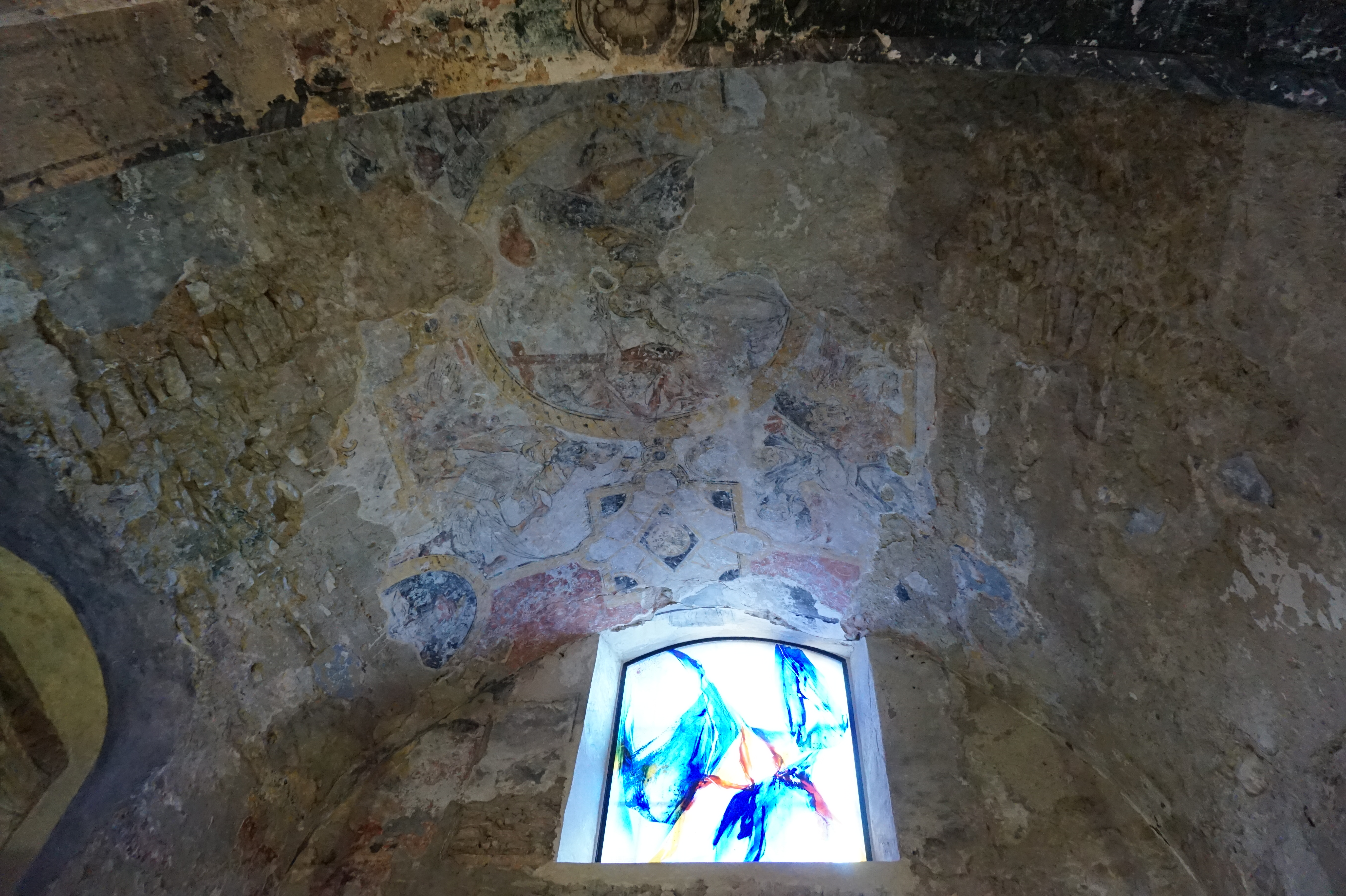 Vestiges de polychromie.